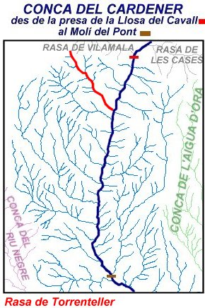 Mapa d'un fragment de la Conca del Cardener (de la press de la Llosa del Cavall al Molí del Pont) on hi apareix remarcada la Rasa de Torrenteller.